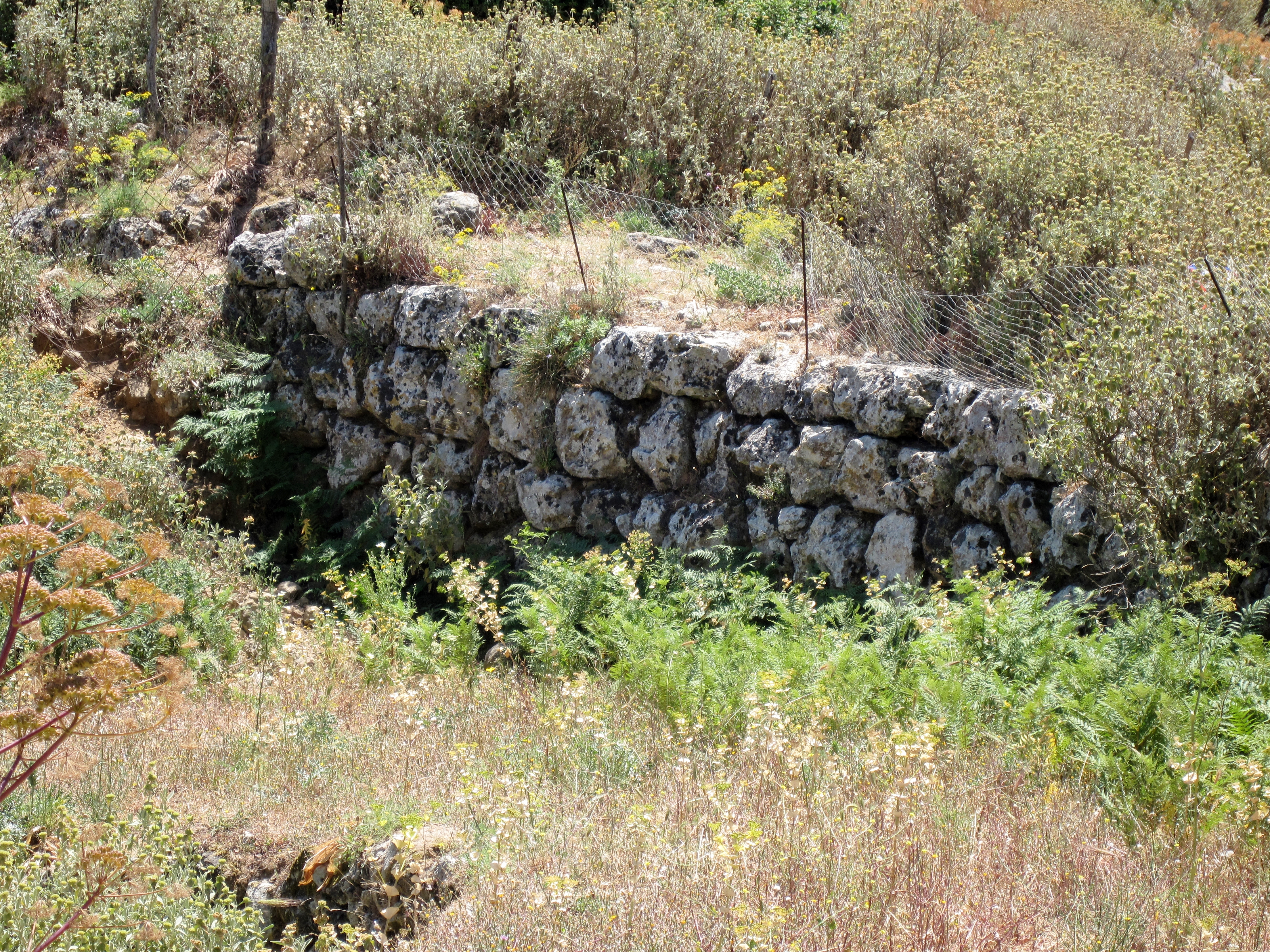 Befestigungsmauer der antiken Stadt Sybrita am Hügel Kefala bei Thronos, Gemeinde Syvritos, Präfektur Rethymno, Kreta, Griechenland